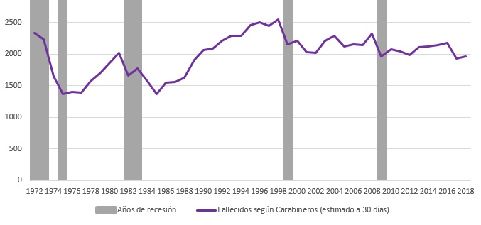 Numero de fallecidos en siniestros de tránsito en Chile entre 1972-2018 (fuente Carabineros de Chile, estimado a 30 días)